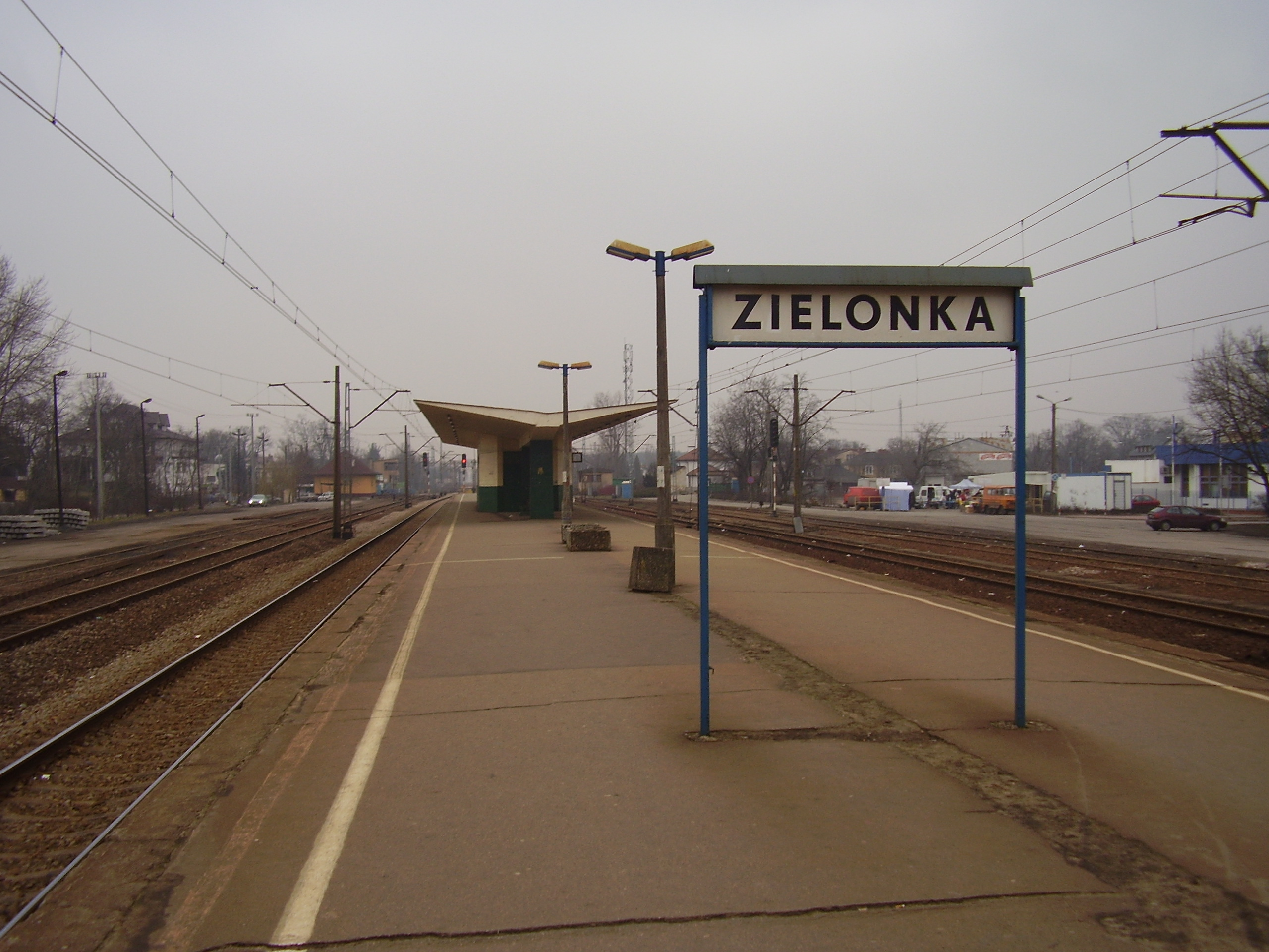 Stacja kolejowa Zielonka. Widok w kierunku Warszawy Wileńskiej.